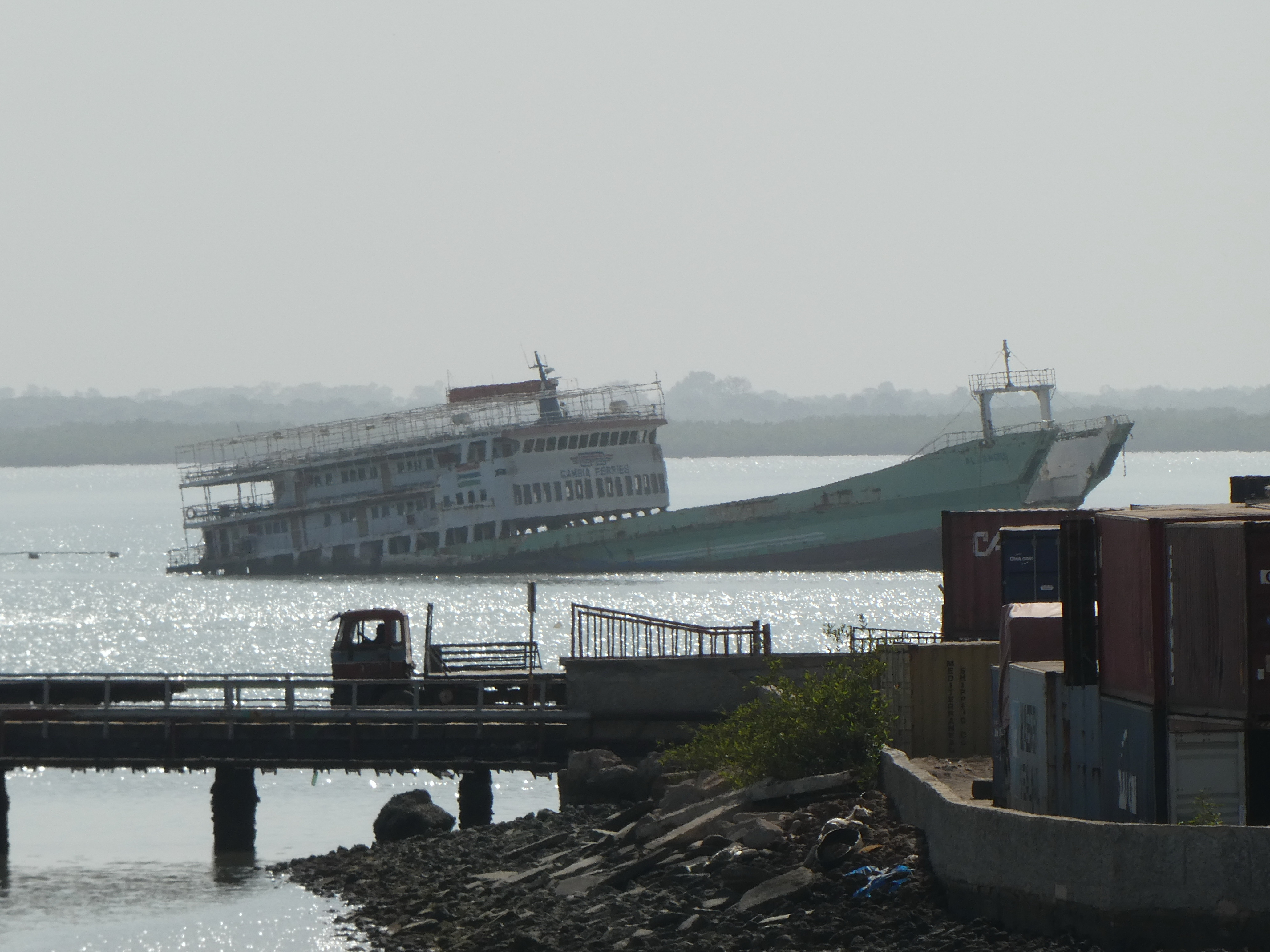 Fähre Aljamdu halb gesunken im Hafen von Banjul